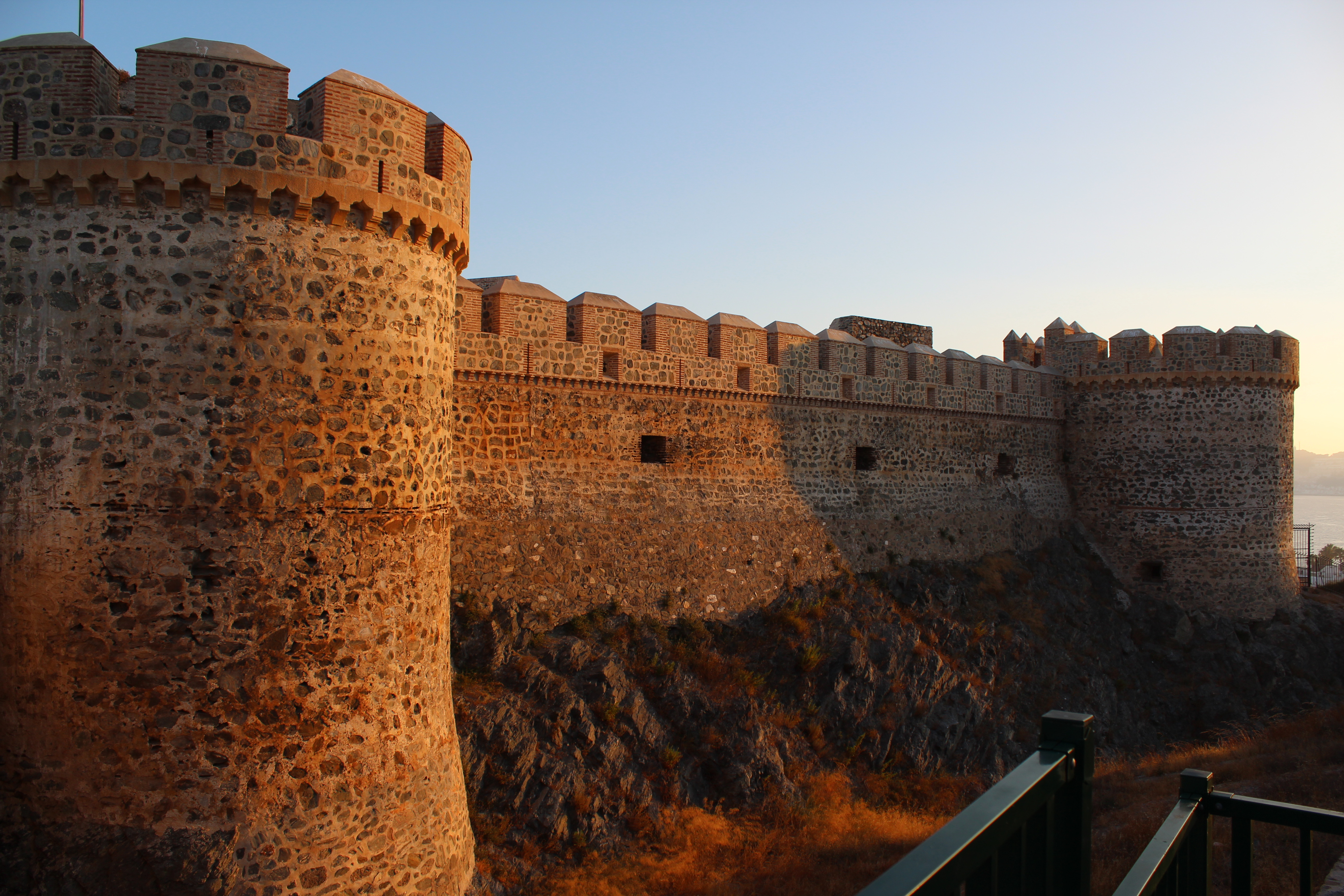 Zona occidental del castillo de San Miguel, Almuñécar.